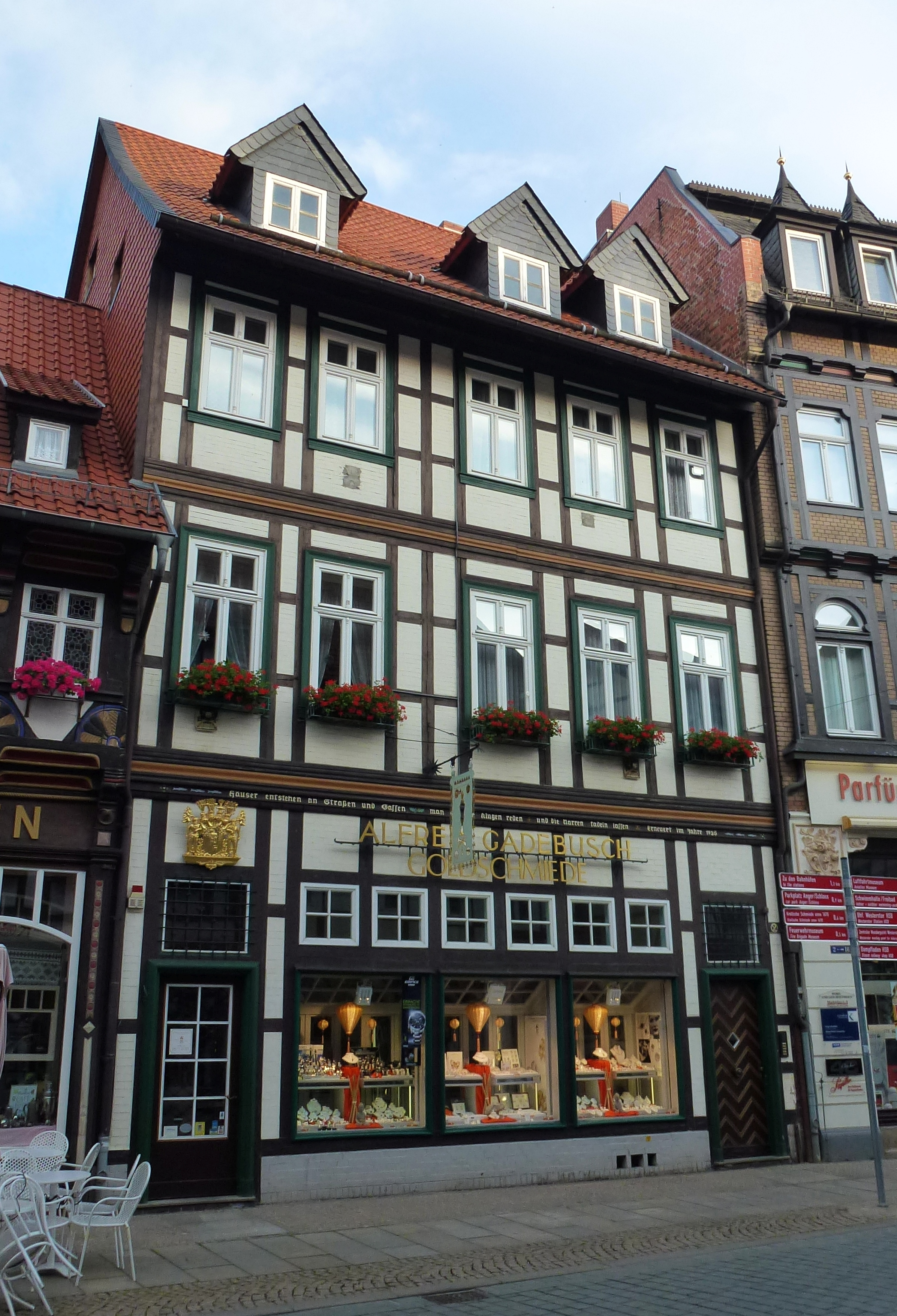 Das Haus Breite Straße 2 in Wernigerode, ein Vorgängerbau ist für 1533 nachgewiesen. Das heutige Haus, welches seit 1890 die Goldschmiede Gadebusch beherbergt, wurde wohl um 1850 errichtet.